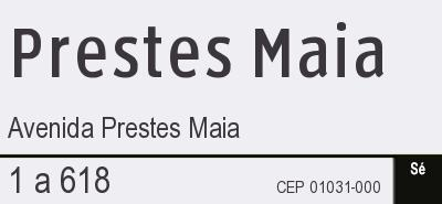 Placa Toponomica da Av. Prestes Maia . CENTRO - SAO PAULO - SP - BRASIL